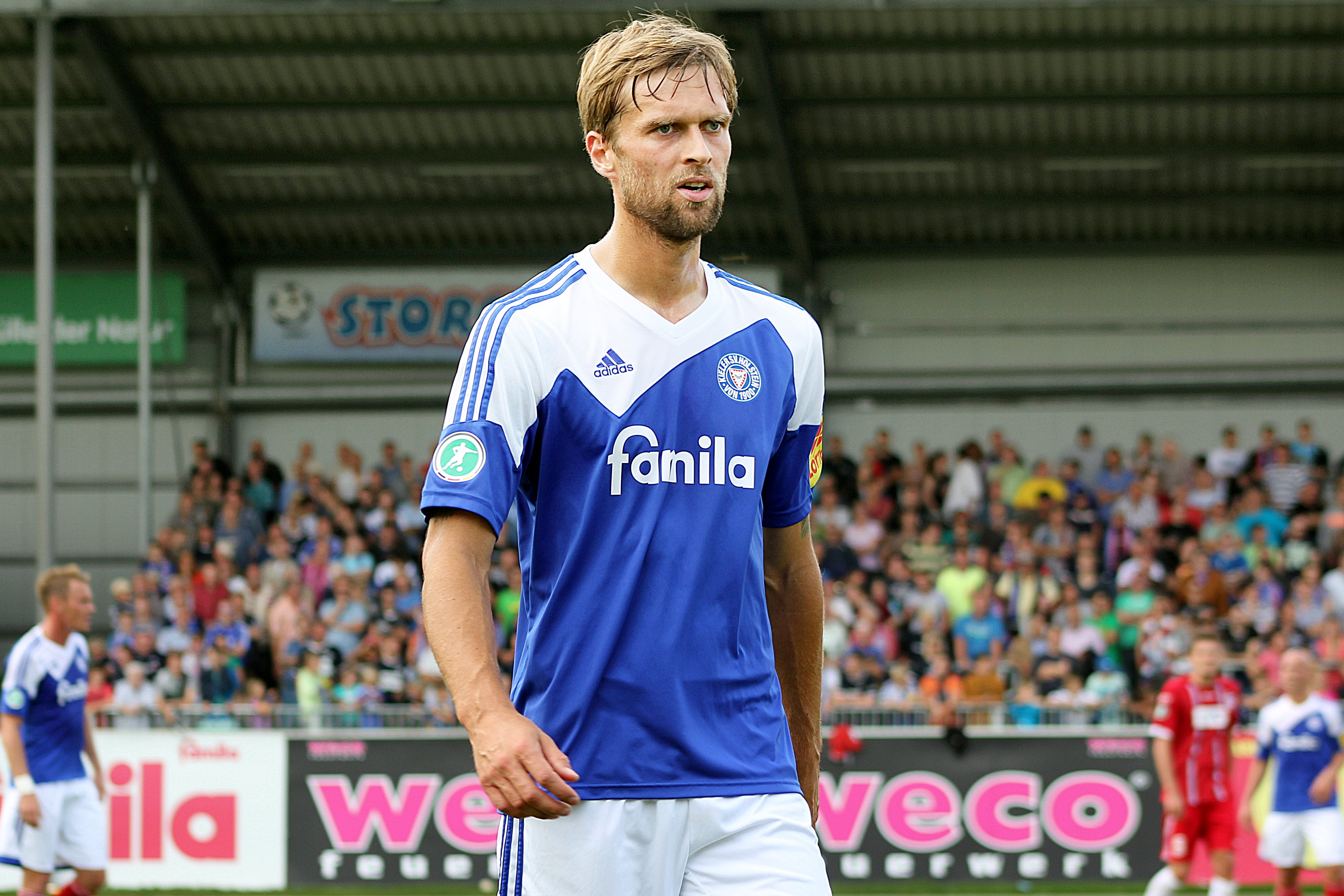 Fiete Sykora während eines Spiel der 3.Liga am 07. September 2013, zwischen Holstein Kiel und dem FC Rot-Weiß Erfurt.